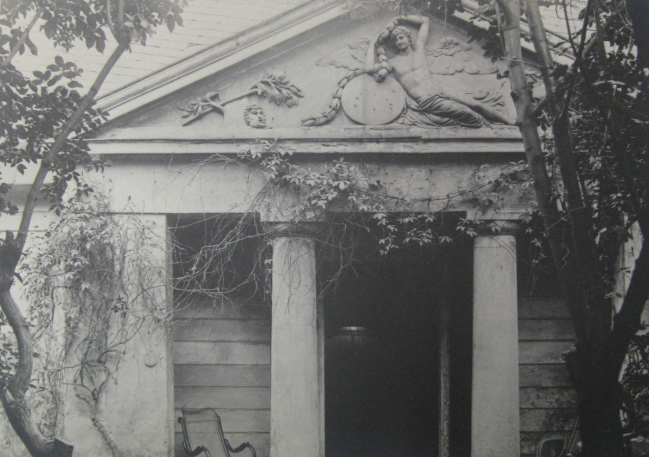 Czartoryski-Schlössel, Teil der Westfront. Inv. PK 357